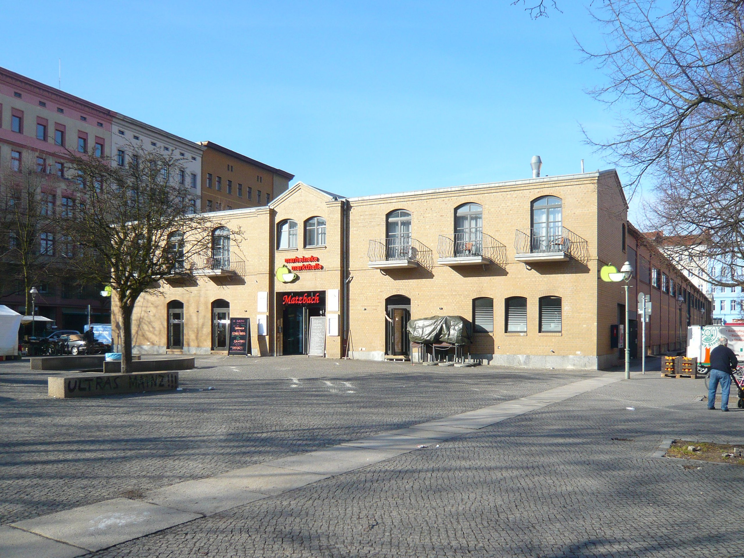 Berlin-Kreuzberg, Marheineke-Halle; Ansicht von Nordosten